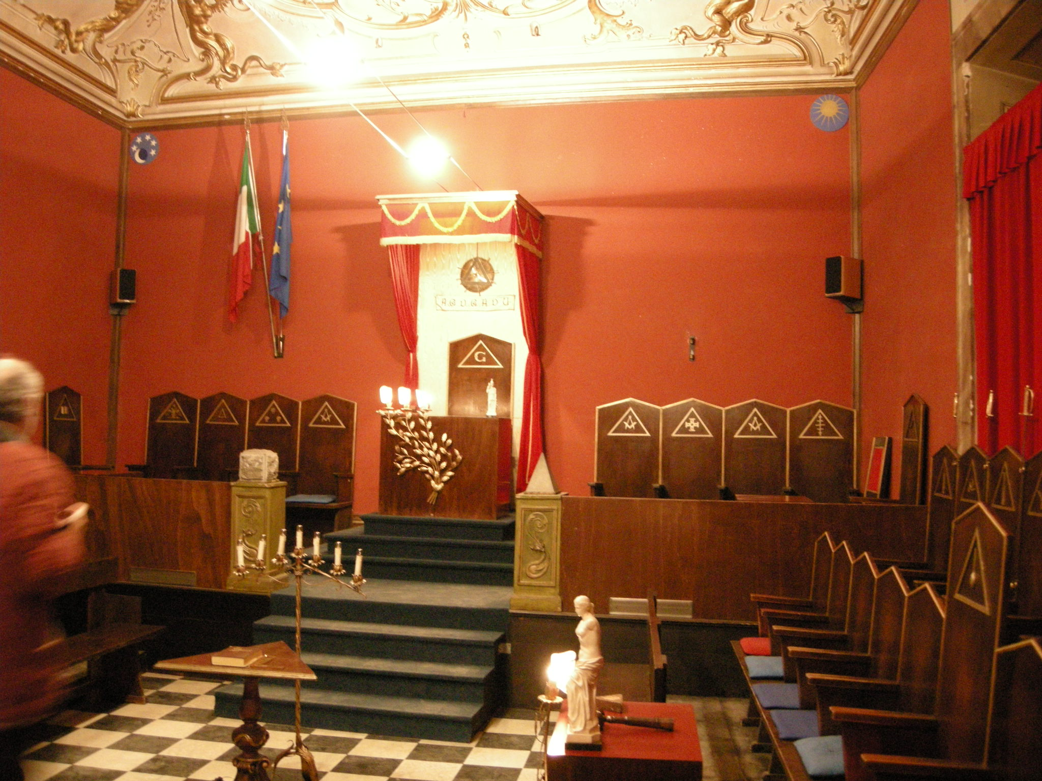 Sala dell'Apoteosi, tempio